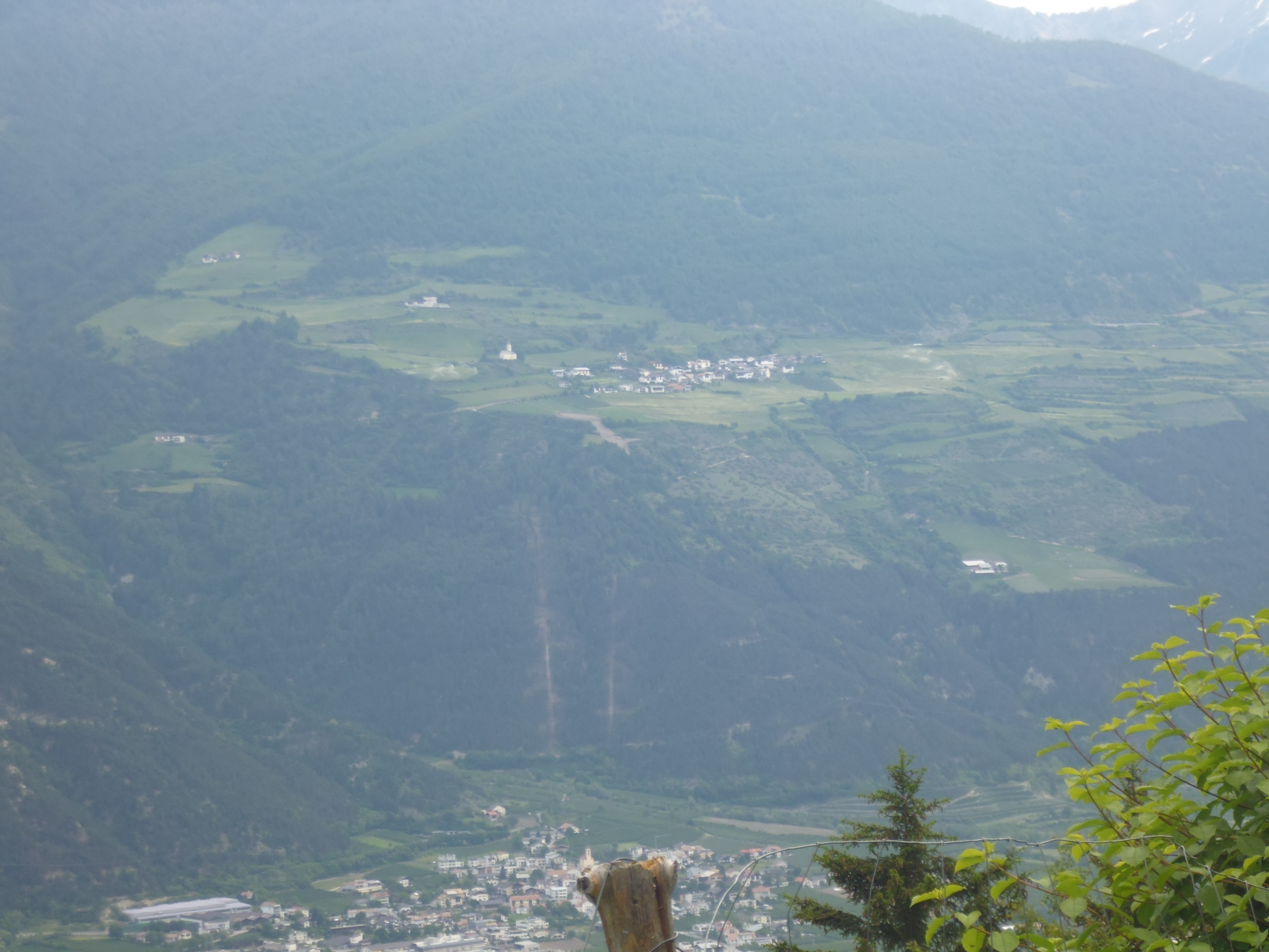 Tanas bei Laas in Südtirol vom Pseghof aus, im Tal Eyrs